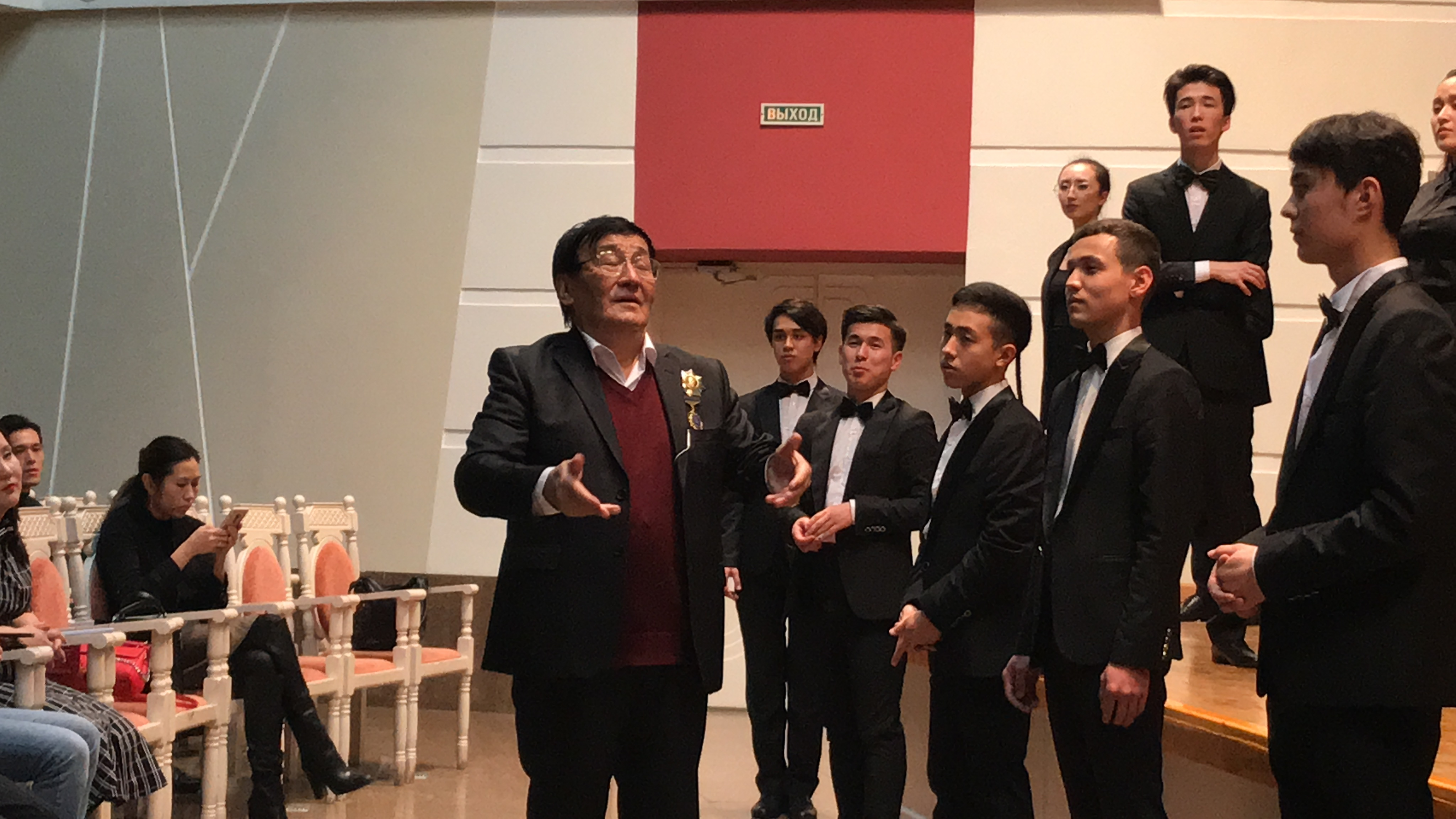 Мастер-класс Базаргали Ажиевича в КазНУИ